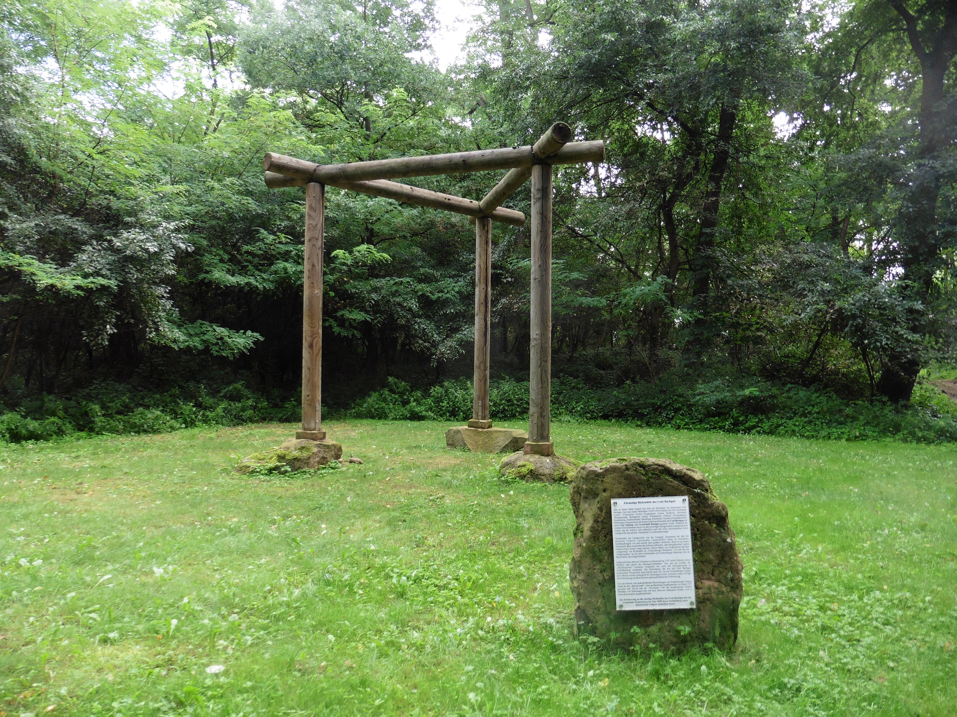 Nachbau (2009) eines historischen Dreiseitgalgens an der Richtstätte der einstigen "Cent Bachgau" im "Niedernberger Wäldchen" an der ehemaligen Römerstraße (heute Main-Radweg) nordwestlich von Niedernberg im unterfränkischen Landkreis Miltenberg. Ansicht von Südwesten.